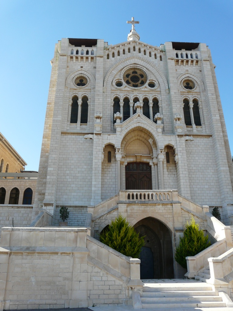 ...errichtet vom Orden der Salesianer.